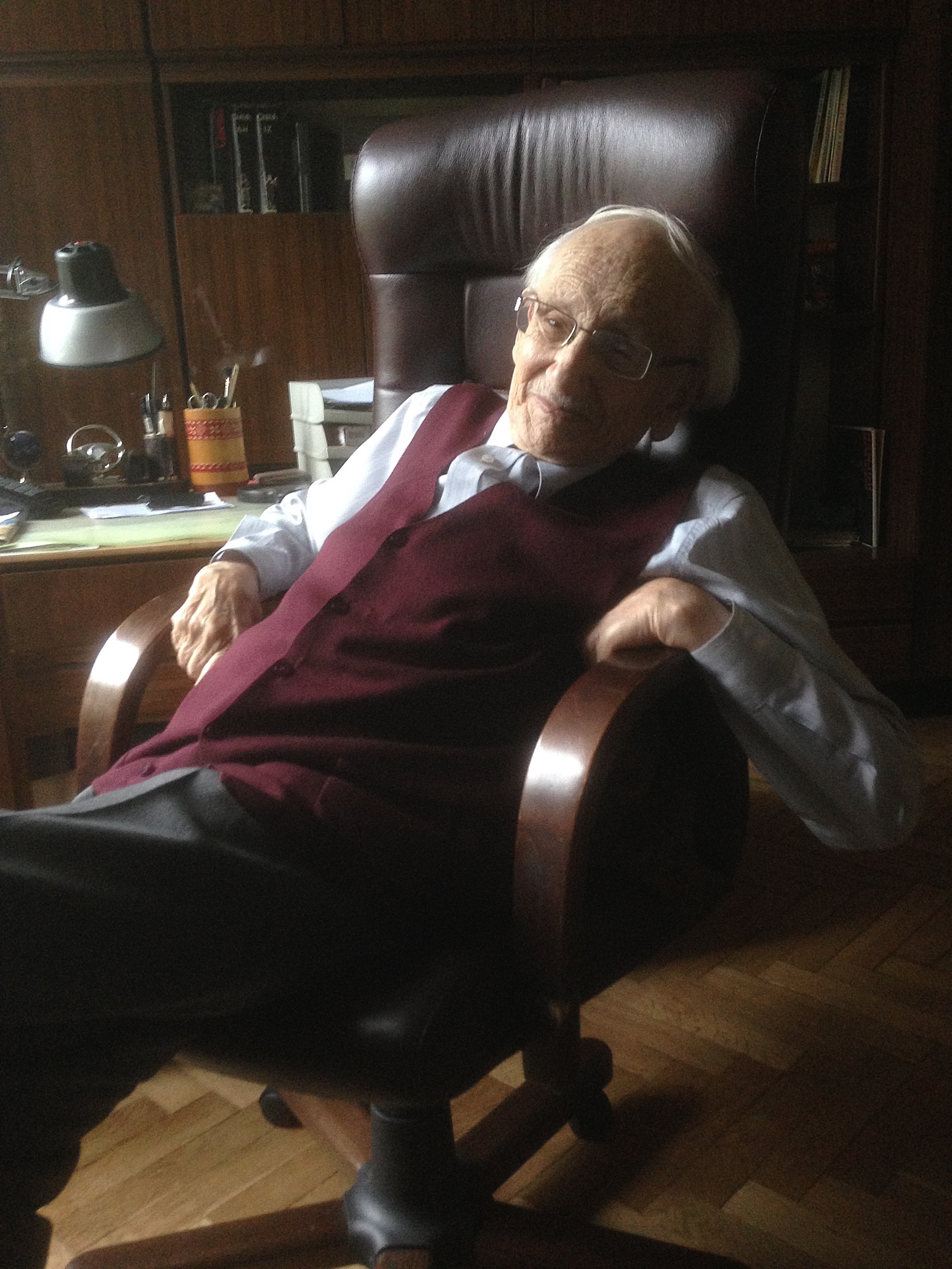 Фото Александра Владимировича Брагинского